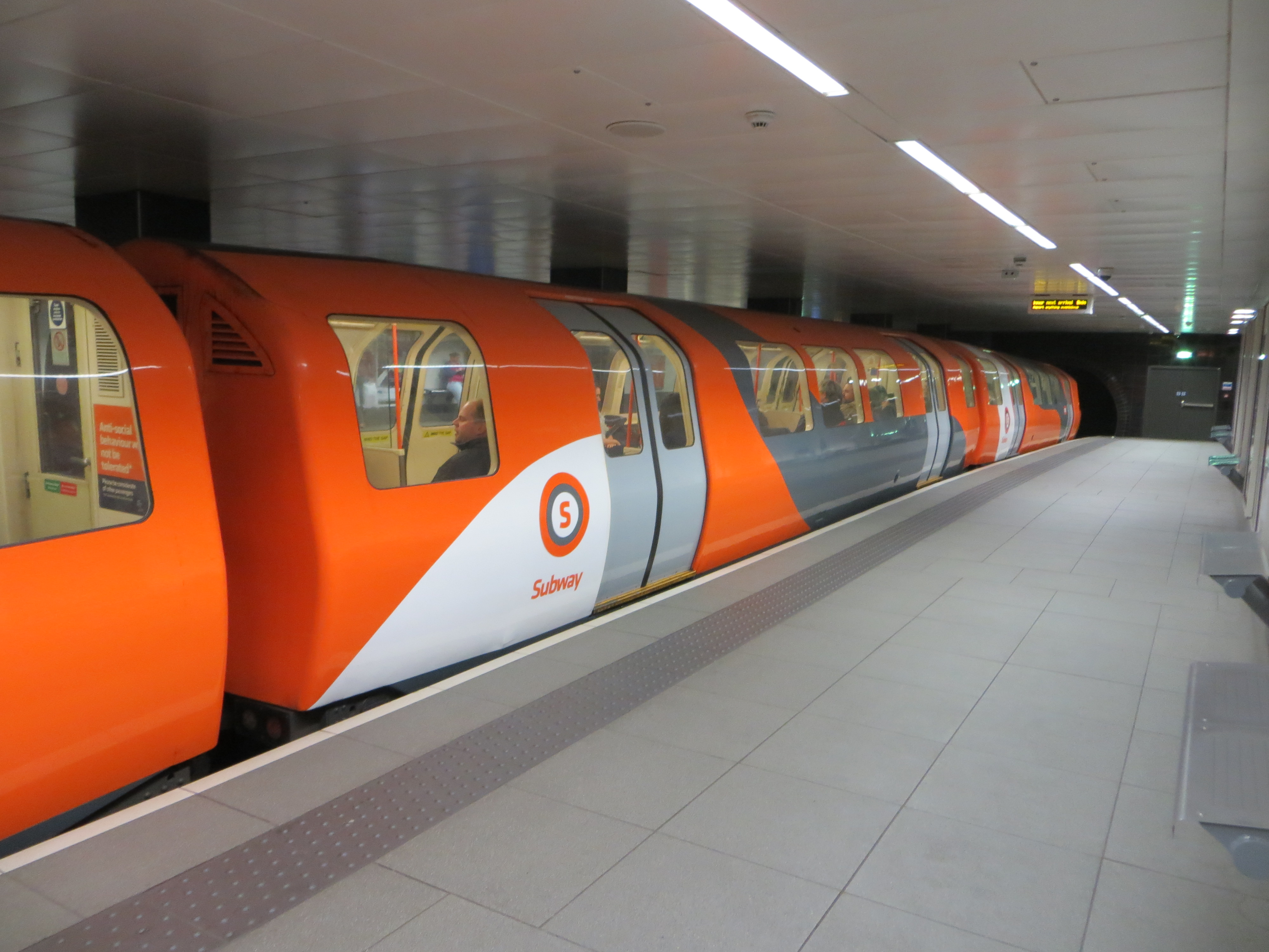 Glasgow Subway